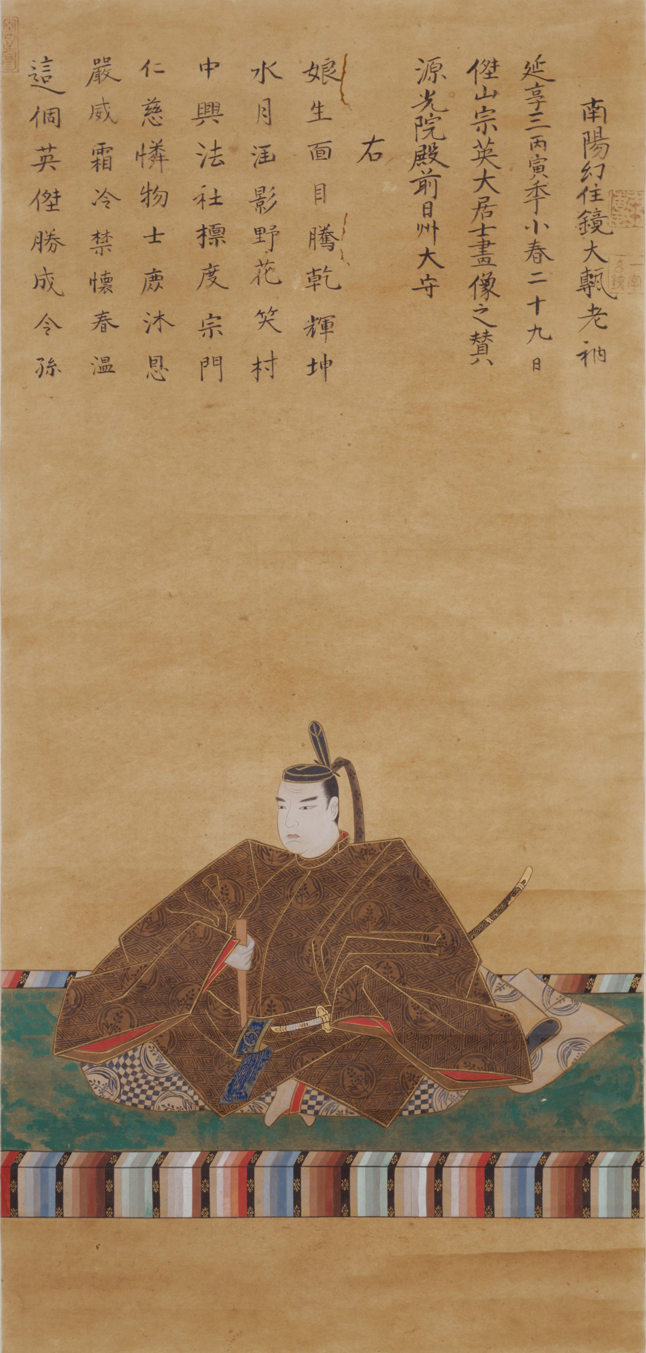 水野勝貞の肖像。